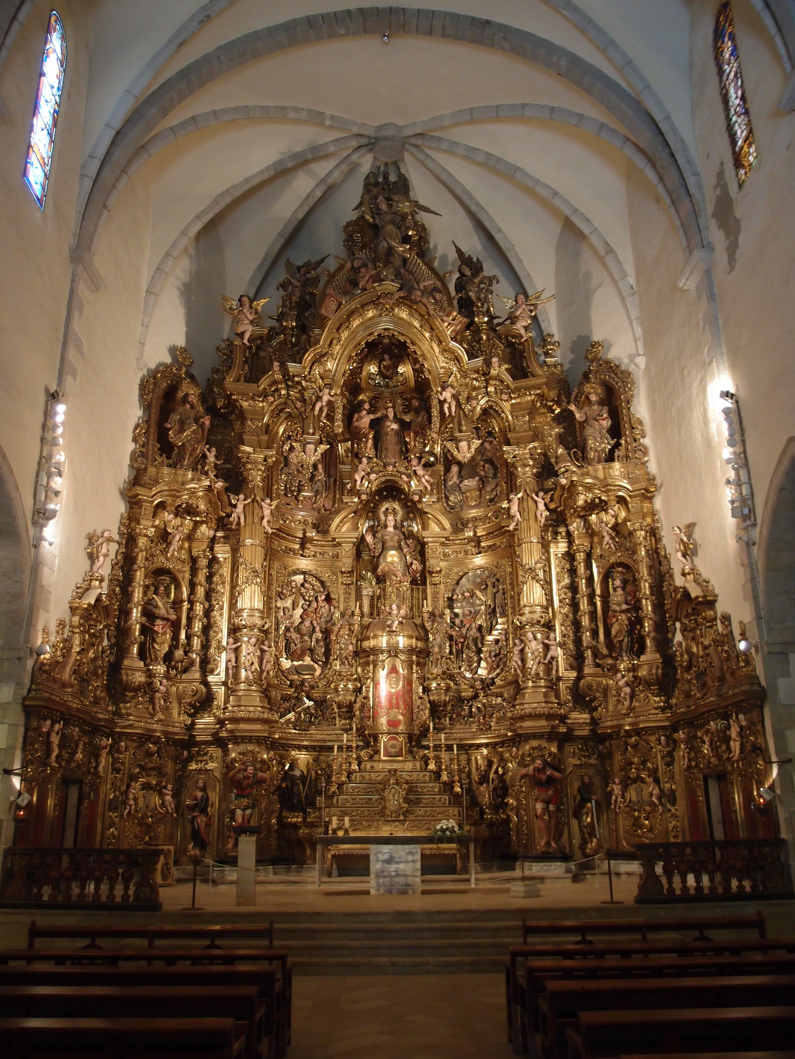 Kirche Santa Maria in Cadaqués (Hauptaltar) Datum: 12.09.2013 Urheber: M. Pfeiffer alias Benutzer:Gordito1869 Quelle: privates Fotoarchiv des Urhebers